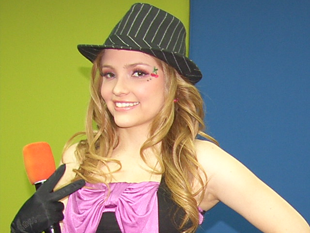 CHERRY EN CUERNAVACA